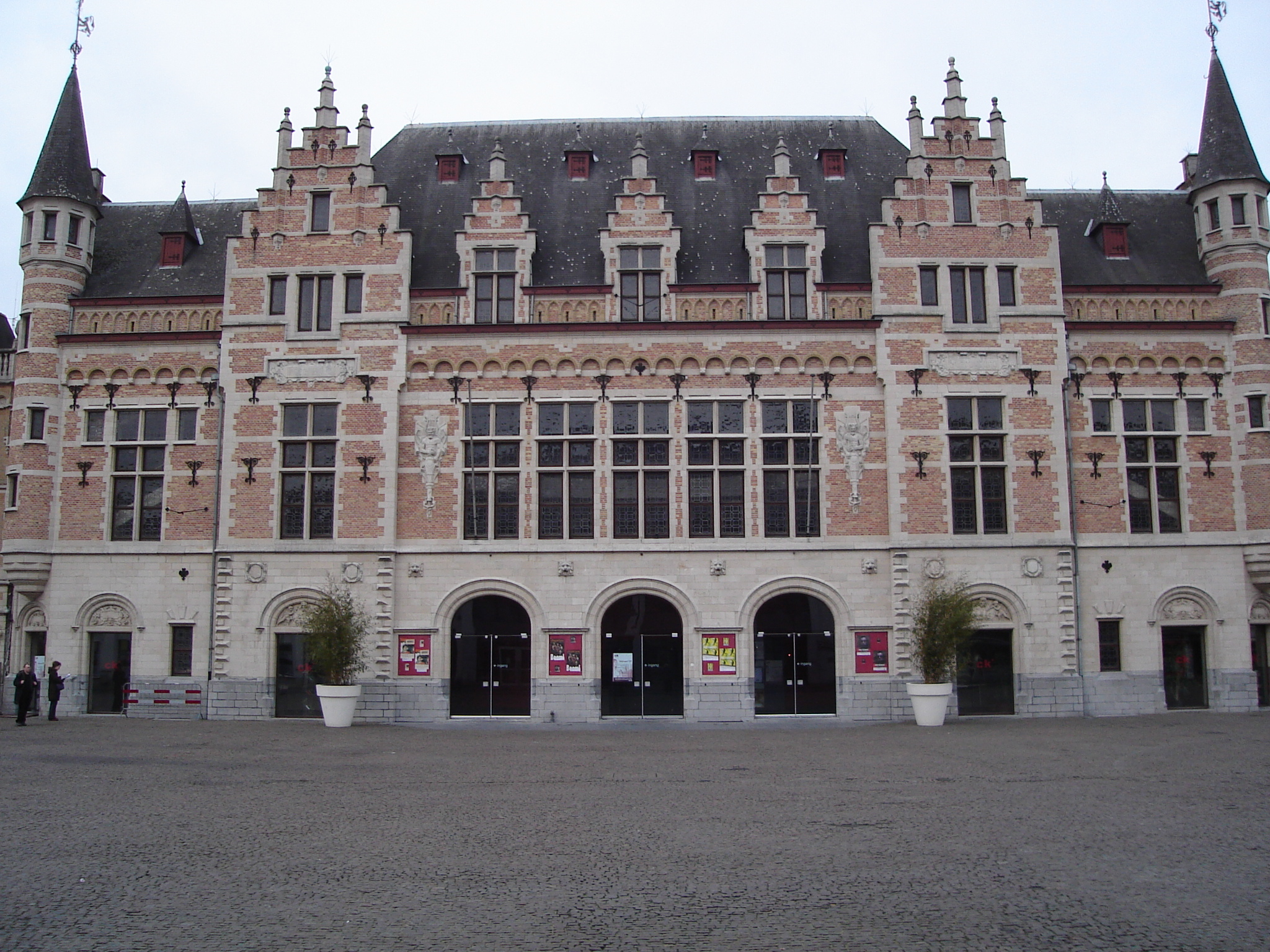 Schouwburg Theatre, Schouwburgplein 14, Kortrijk, Belgium. Built 1920